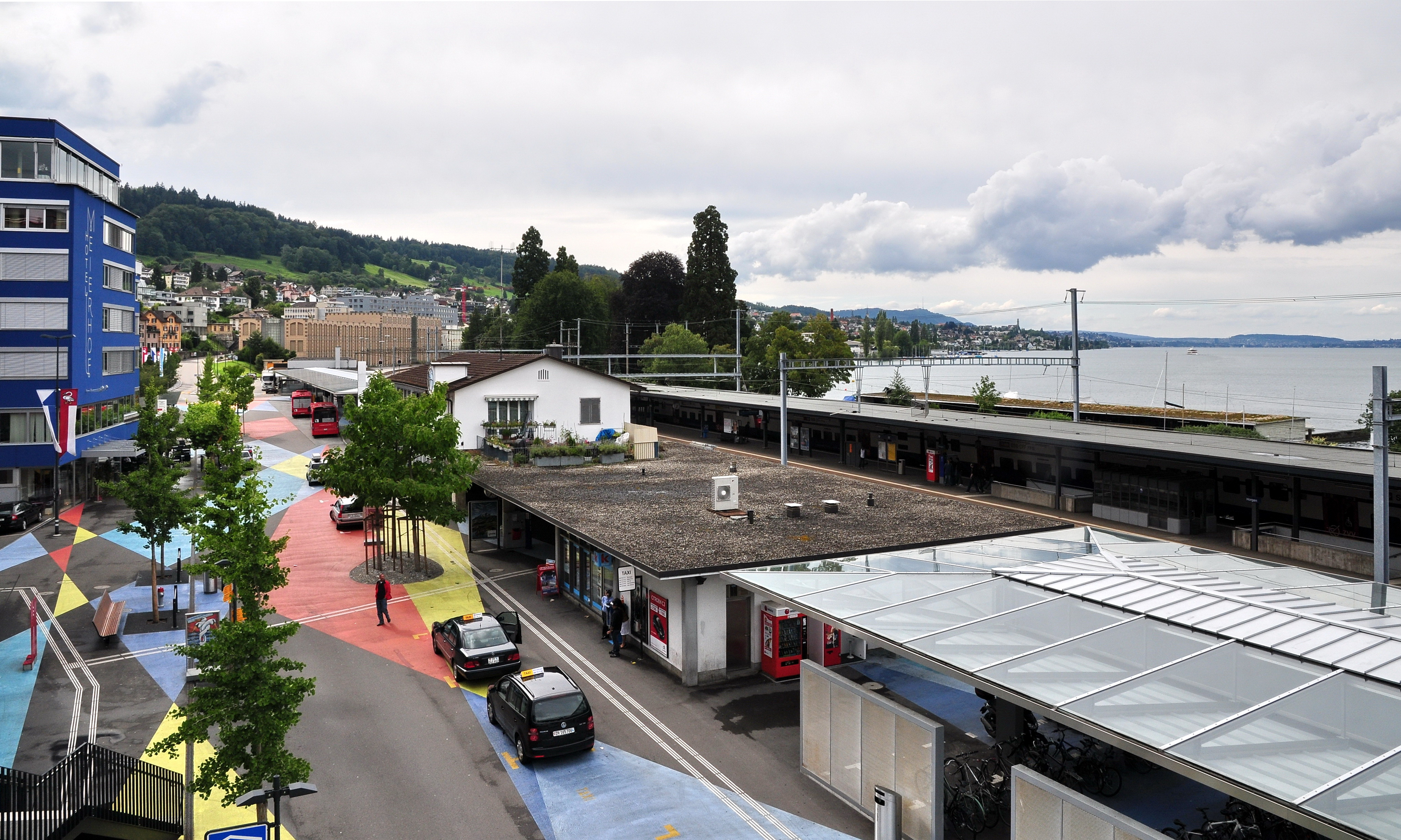 Bahnhof in Horgen (Switzerland)